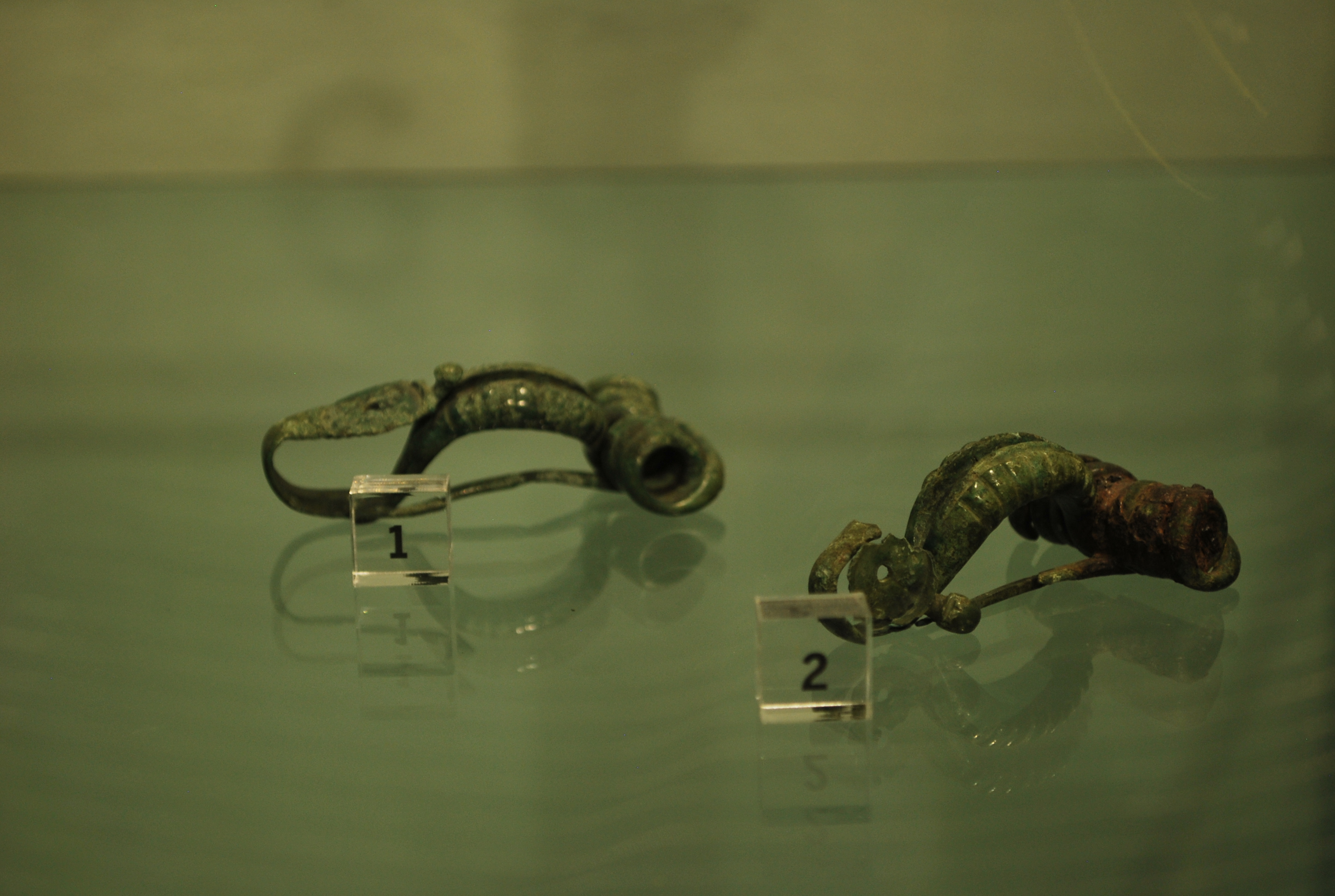 S3 V6 tomba 139 fibule di bronzo - Sezione archeologica Enrico Bianchetti Ornavasso